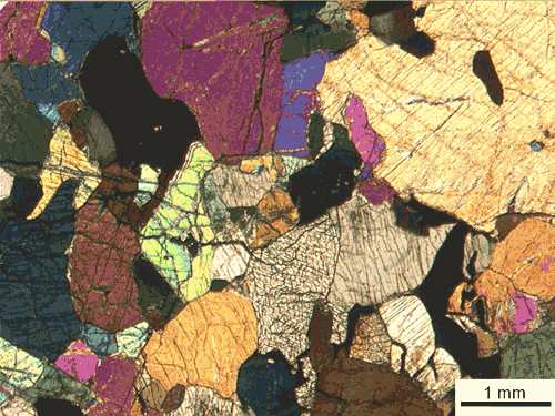 Lherzolite. nicol incrociati